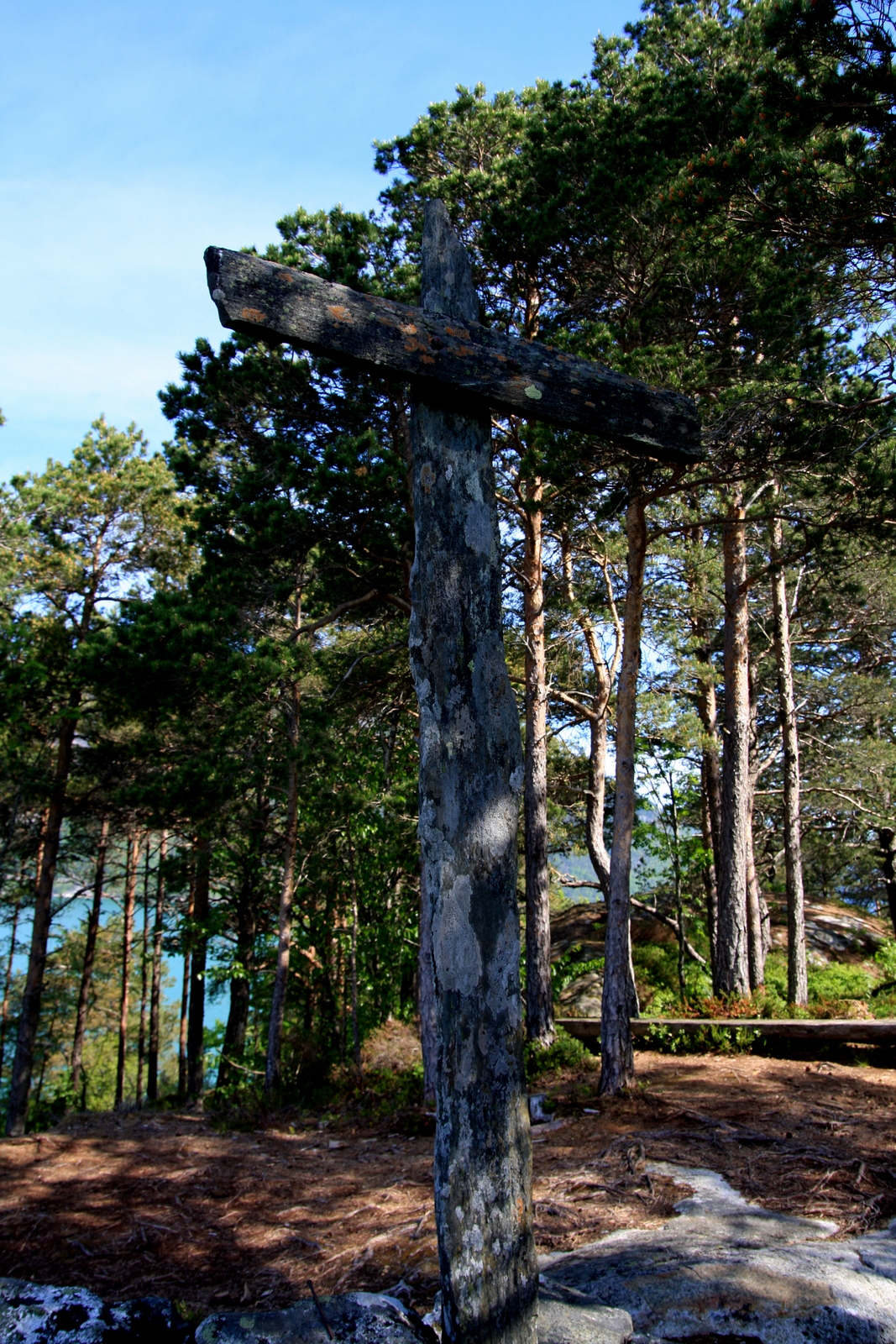 Steinkrossen ved Hesthamar, minnesmerke for